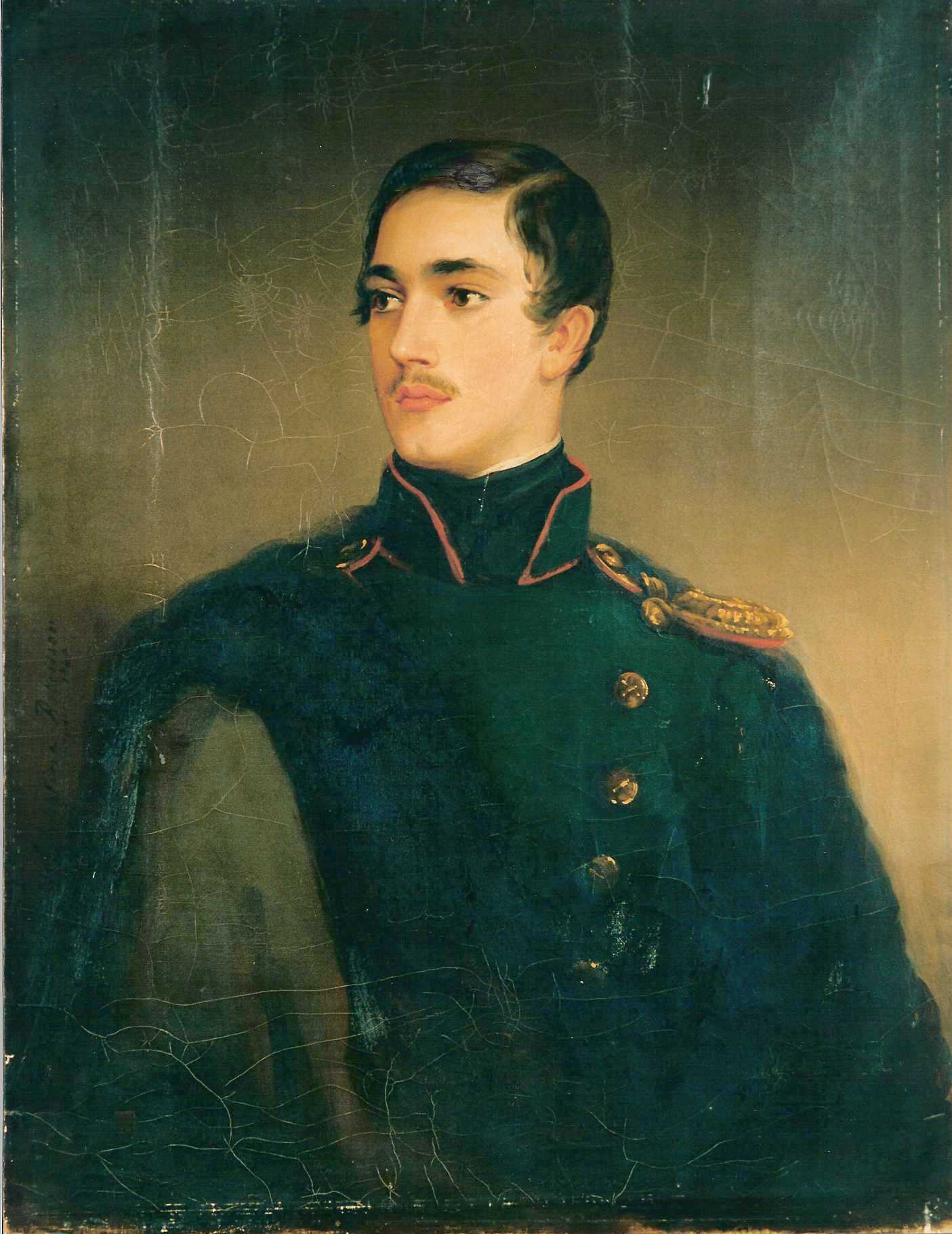 Князь Барятинский Анатолий Иванович (1821-1881) - Кристина Робертсон, 1840.